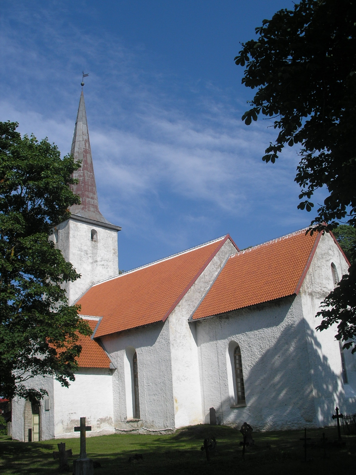 Viru-Nigula kirik.